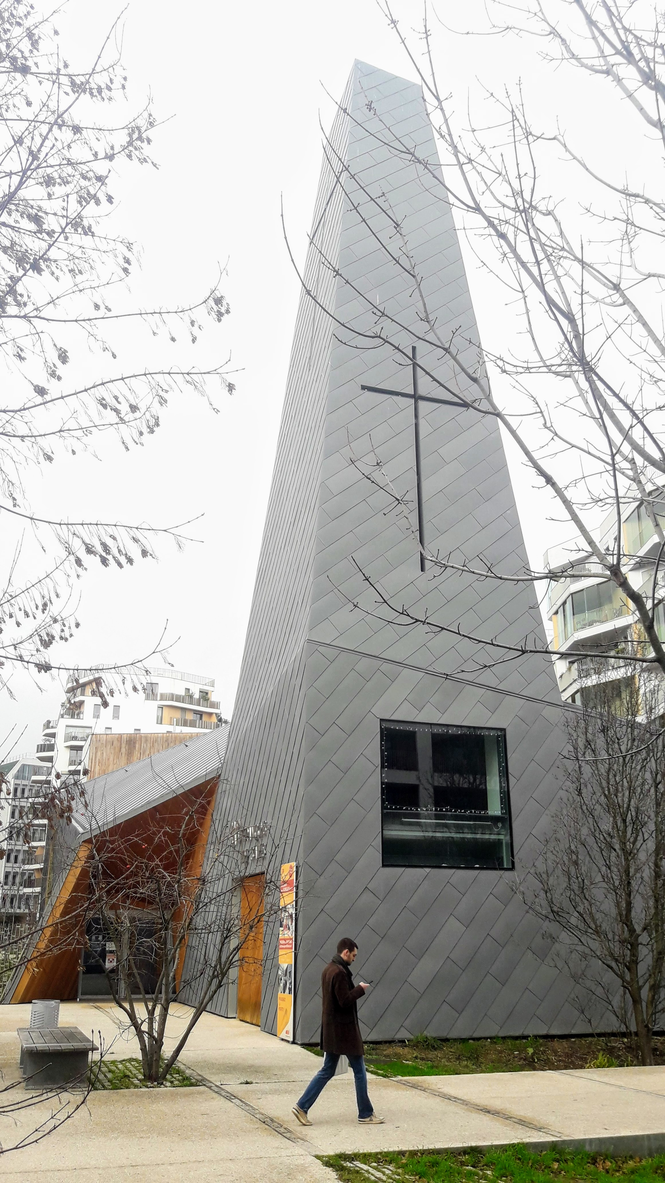 Maison d'église Saint François de Sales de Boulogne-Billancourt (Hauts de Seine)